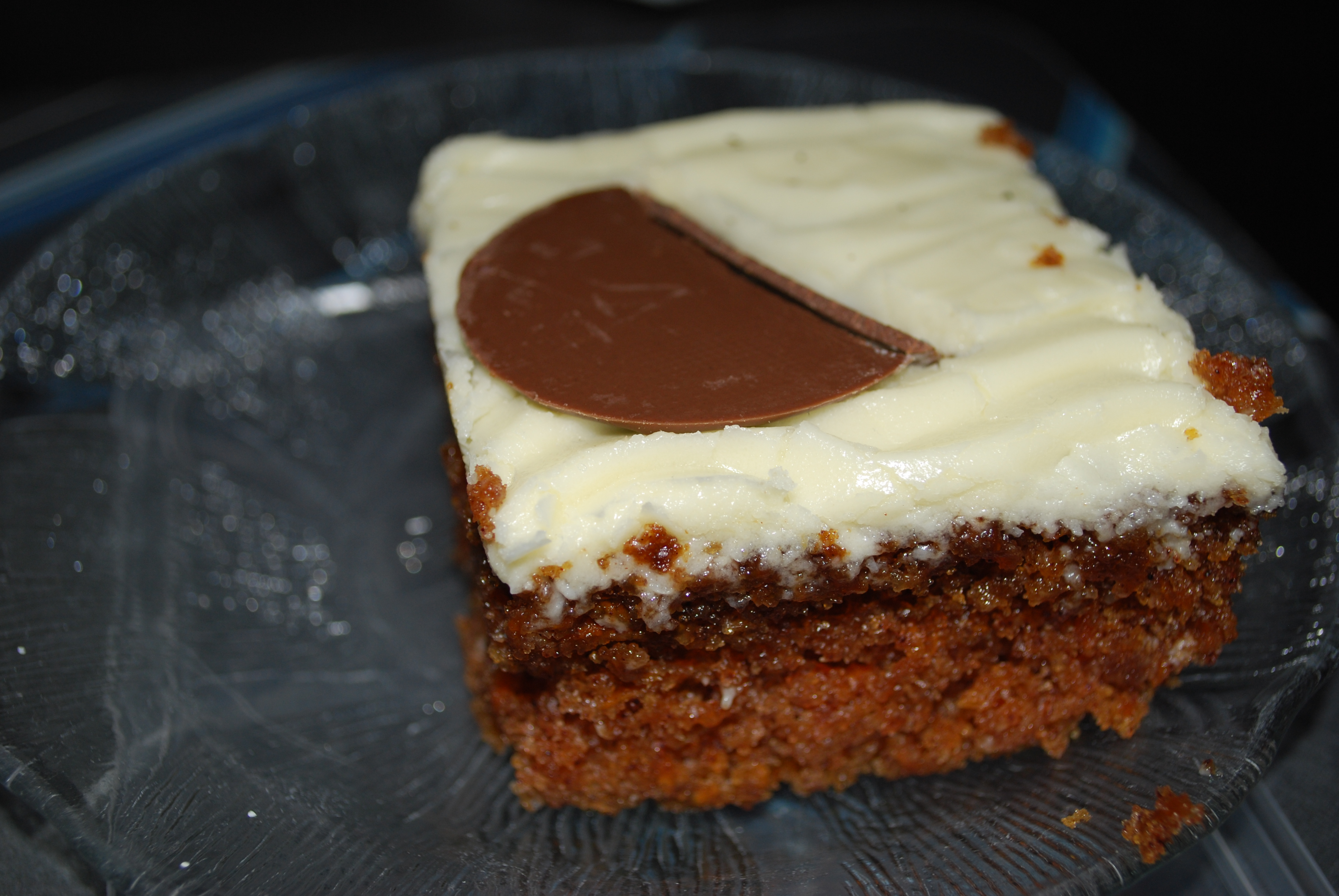 Bild på morotskaka